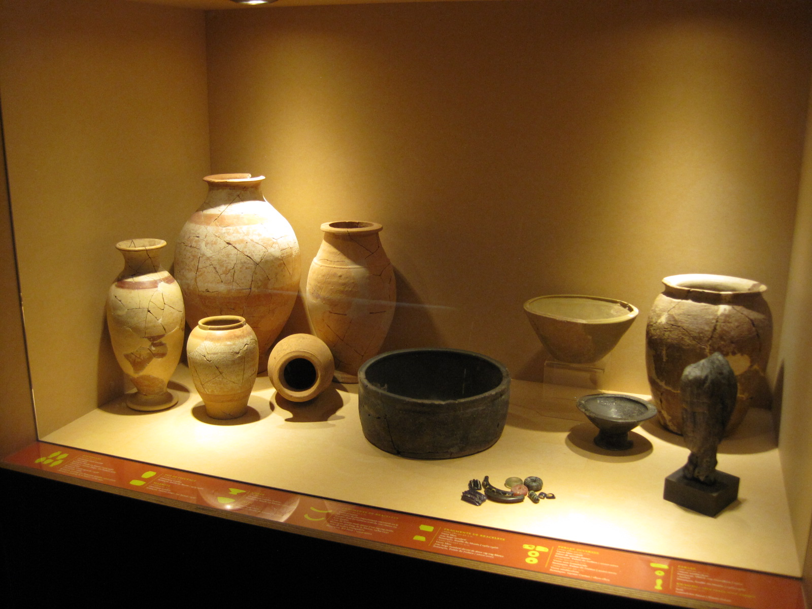 Archéologie au Musée des Beaux-Arts de Besançon